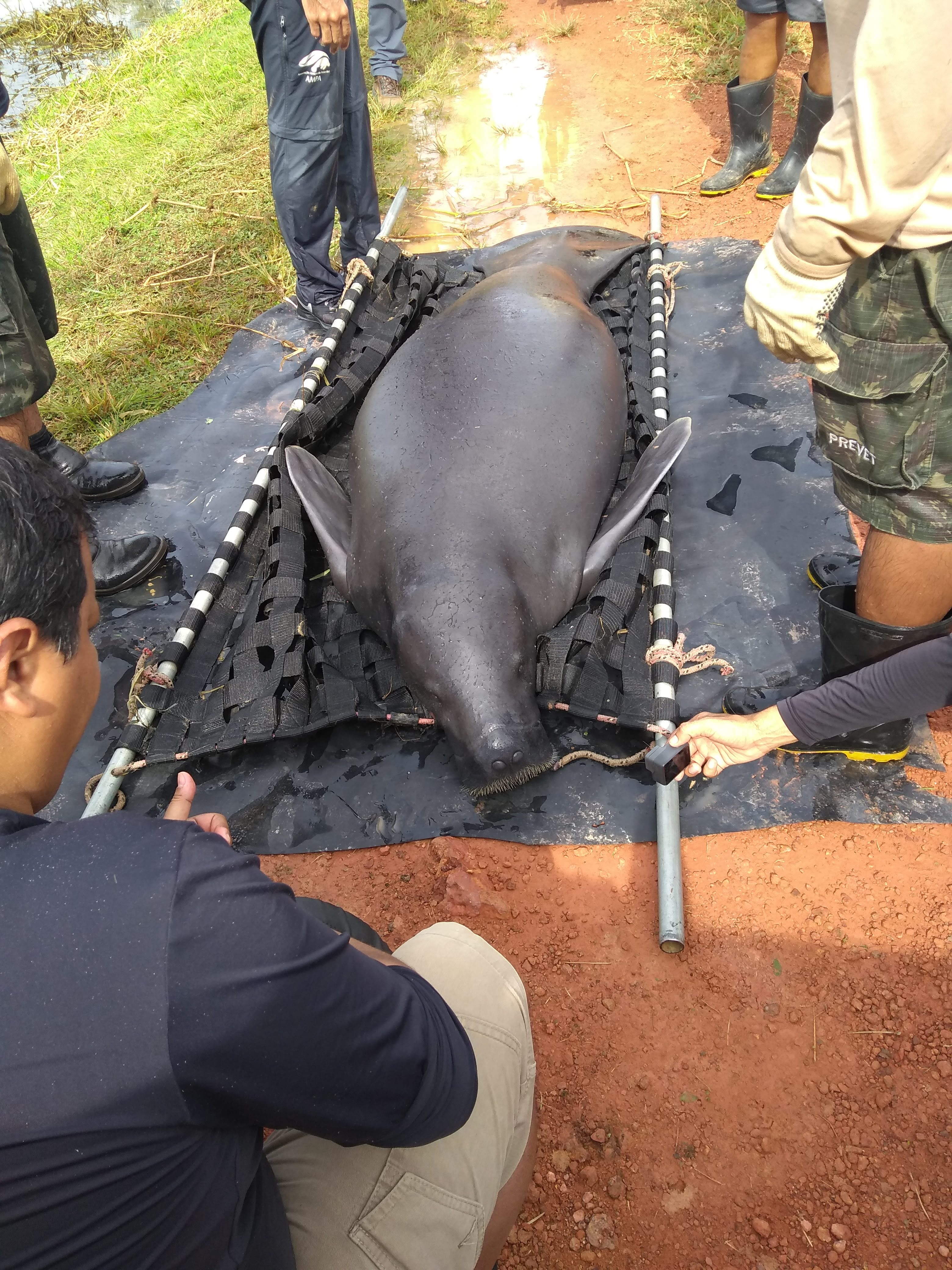 Programa de reintrodução de peixe-boi amazônico realizado pelo INPA (Instituto Nacional de Pesquisas da Amazônia) e colaboradores.